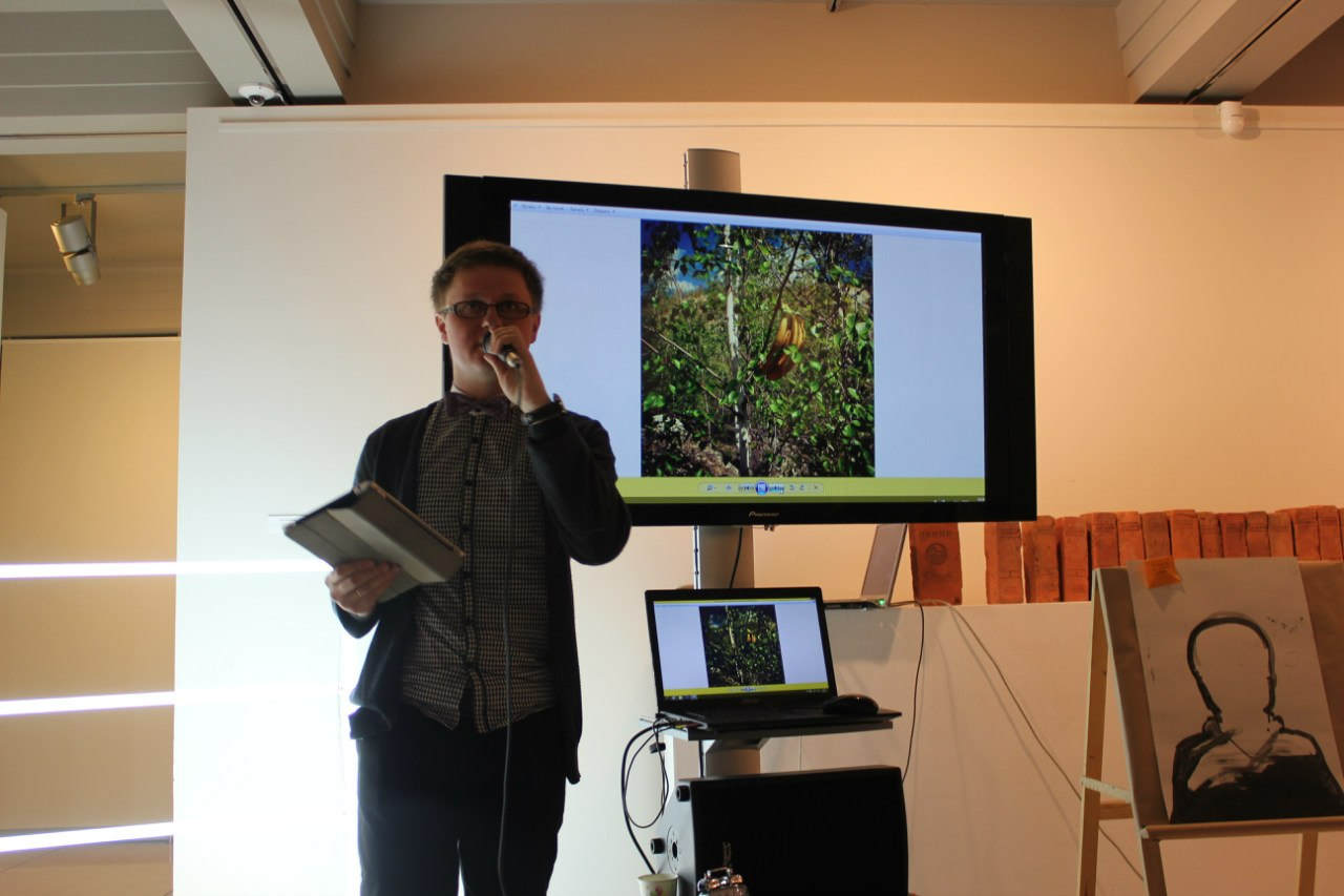 Константин Зацепин арт-елка 2014. Галерия Виктория, Самара